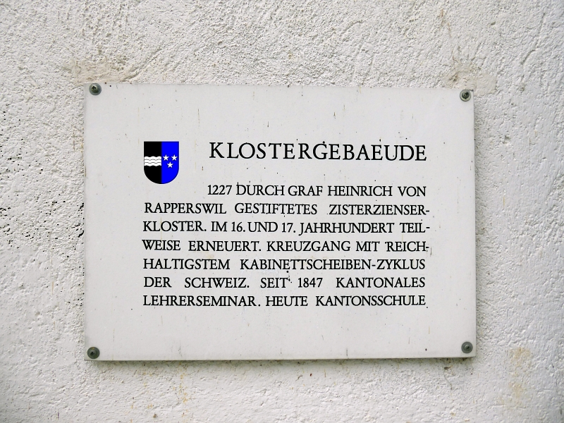 Informationstafel, Klostergebäude Wettingen